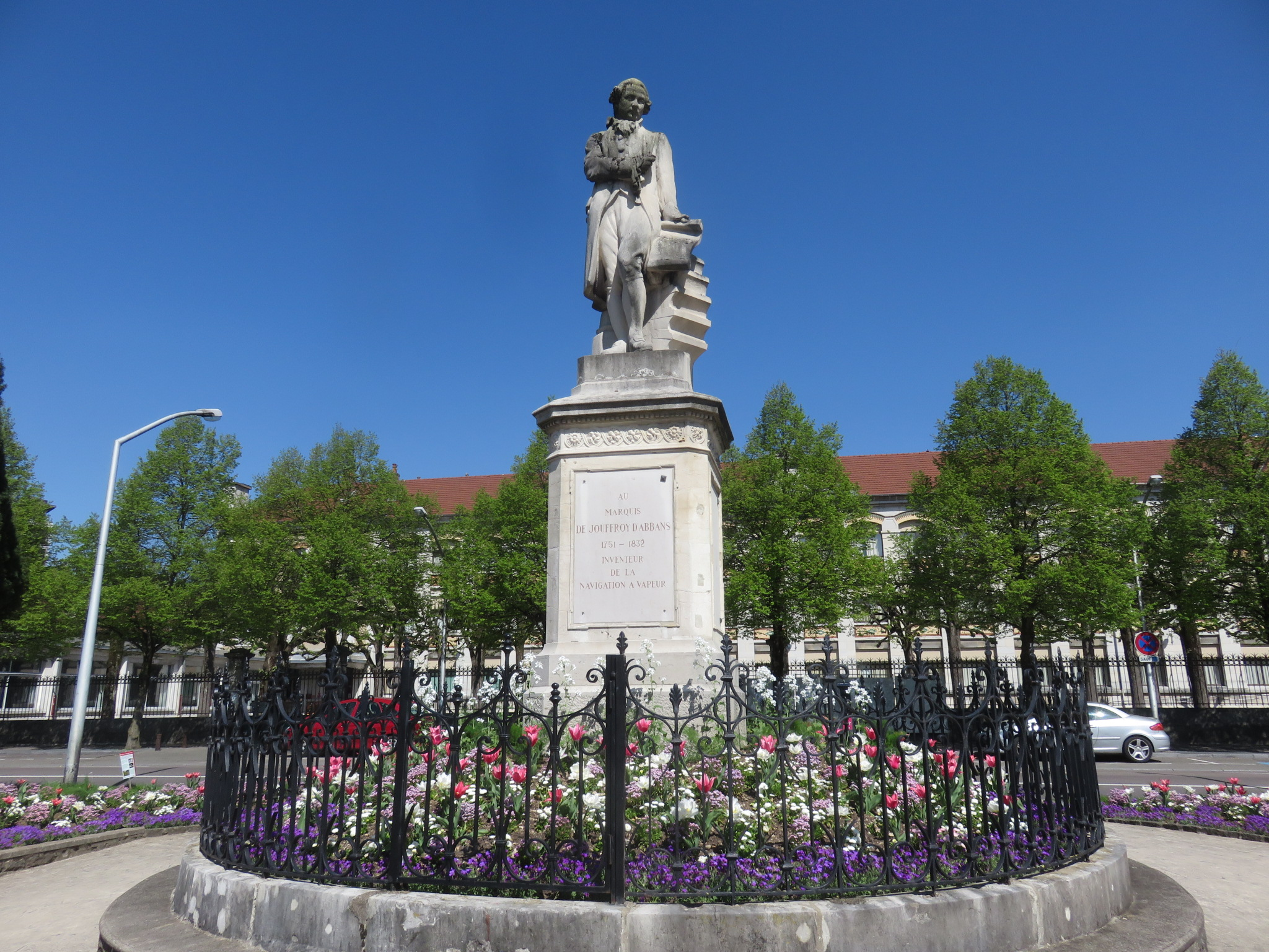 Claude François Jouffroy d'Abbans, Promenade de l'Helvétie au bord du Doubs, à Besançon